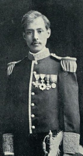 陸奥広吉 むつひろきち